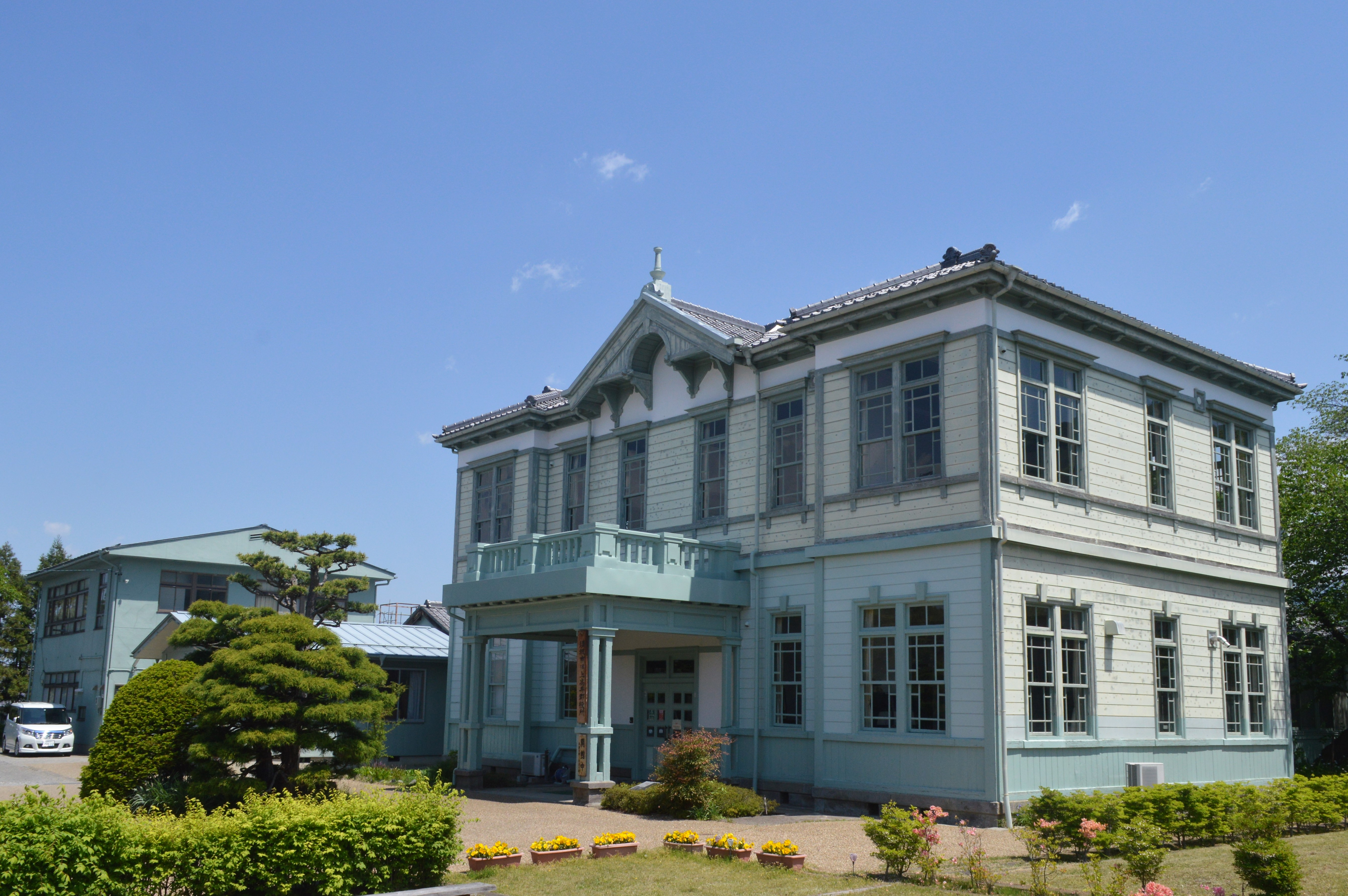 長野県須坂市にある旧上高井郡役所。1917年竣工。須坂市文書館が入所。